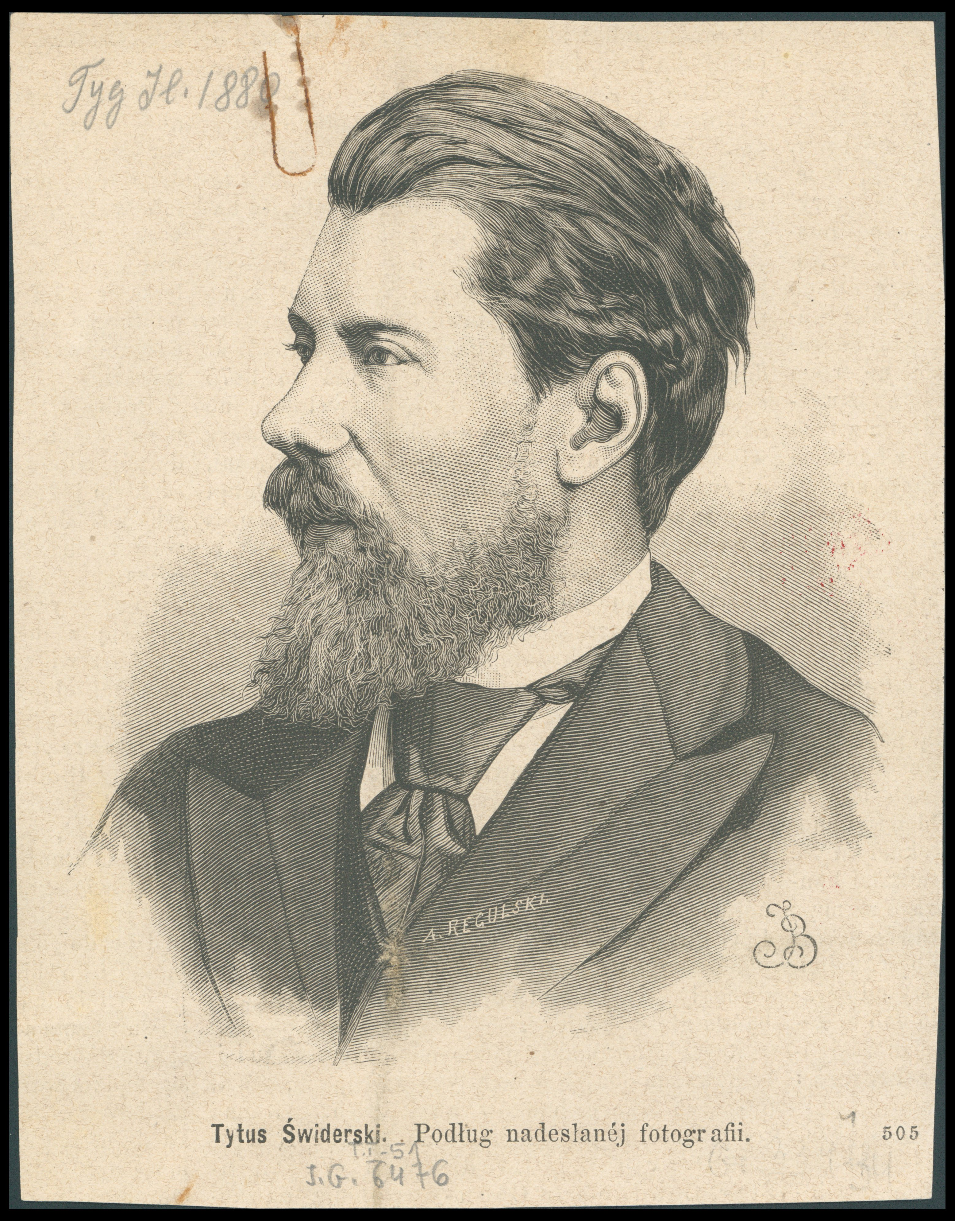 Tytus Świderski